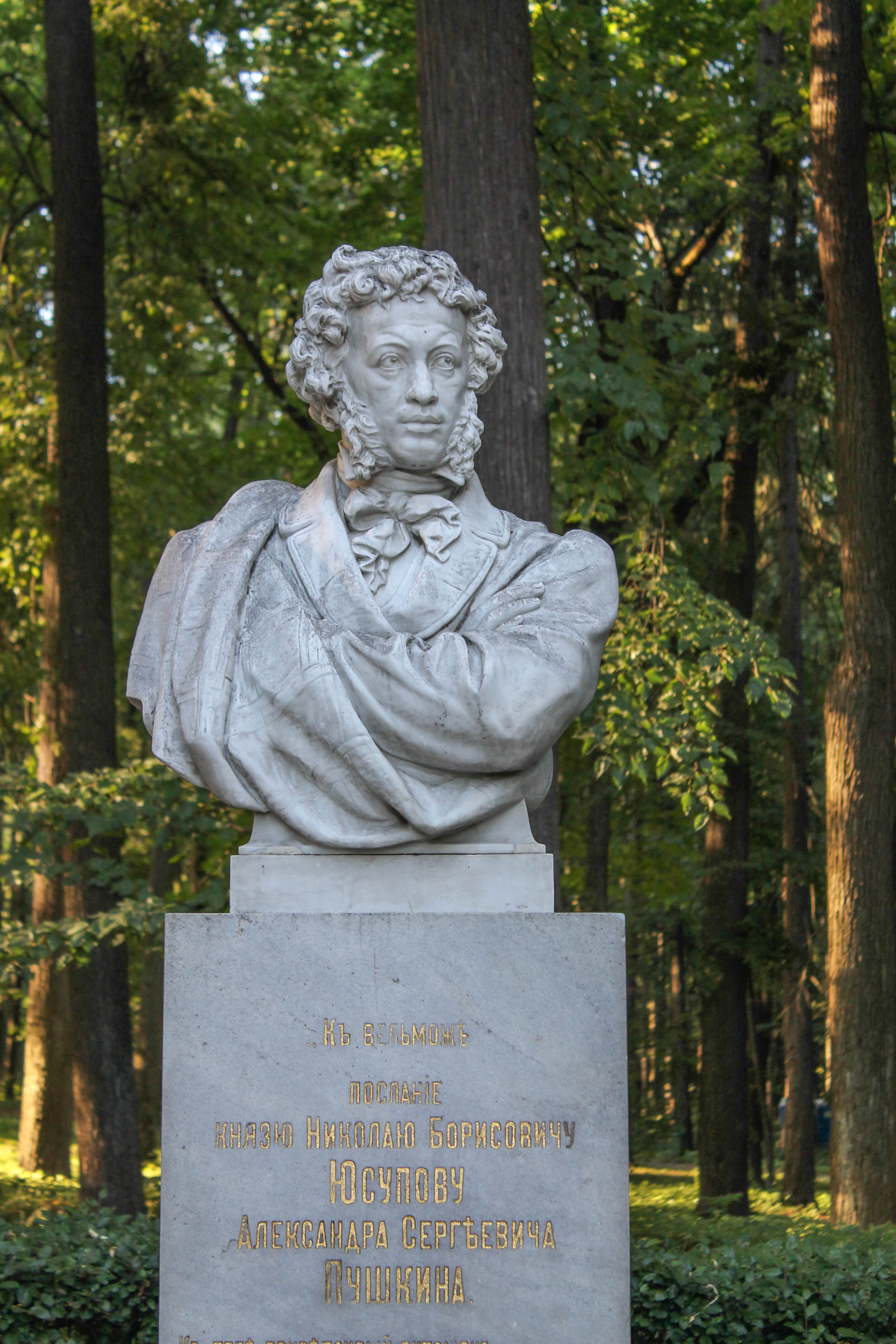 Памятник А. С. Пушкину: Архангельское, Красногорский район, Московская область